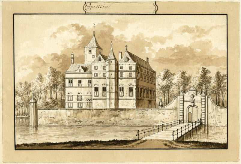 Gegevens cataloguskaartje: Heiloo. Ypestein, voorzijde, met brug en toegangspoort. "Ipestein". Tekening met penseel in bruin door A.Rademaker, ca.1720. h.15½, br.24 cm. blad: 253 x 316 mm. Herkomst: onbekend. (NB. hier tegenwoordig de Willibrordusstichting) Identificatienummer: 53-004526 K